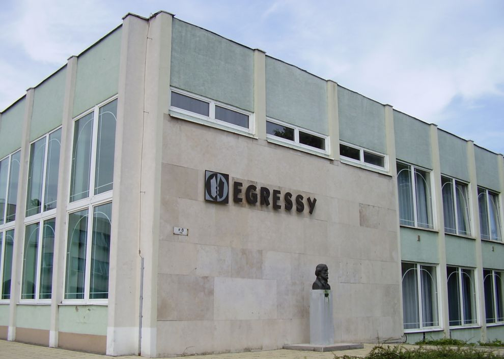 Egressy Béni Könyvtár, Kulturális és Sport Központ. Kazincbarcika, Fő tér 5.